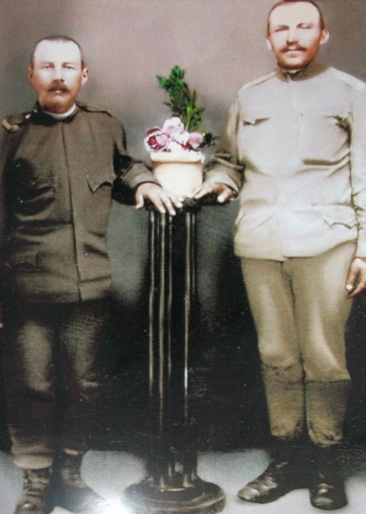 Tineri din comuna Aruncuta { Chereches Sandor si Bogatean Indrei }, inrolati in armata austro - ungara {1914} si participanti activi in primul razboi mondial